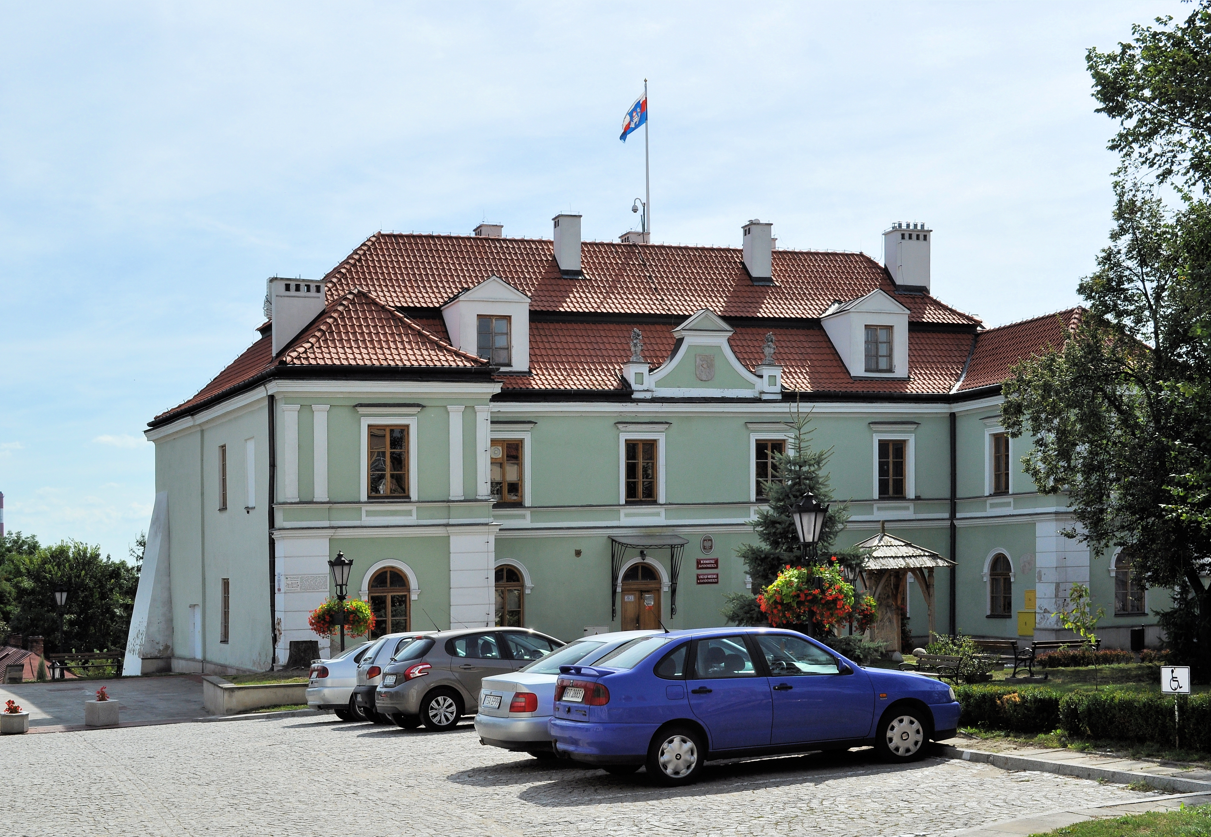 Dawny klasztor dominikanów, obecnie Urząd Miejski. 748 z 5.01.1998.